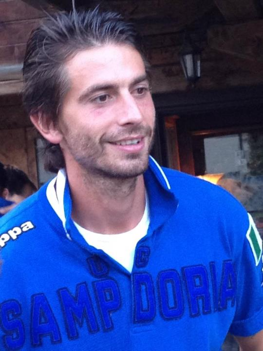 Gianni Munari durante il ritiro della Sampdoria a Bardonecchia.